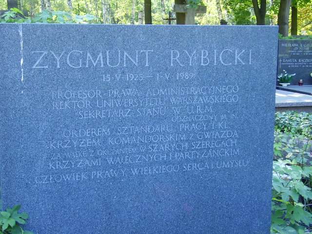 Nagrobek Zygmunta Rybickiego (1925-1989)